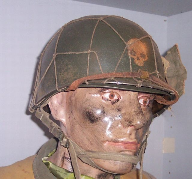 M1, US WWII helmet